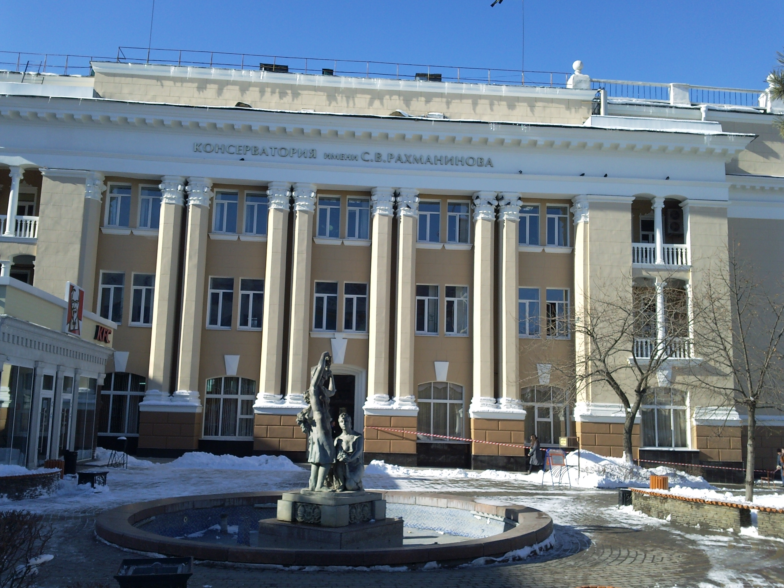 г. Ростов-на-Дону